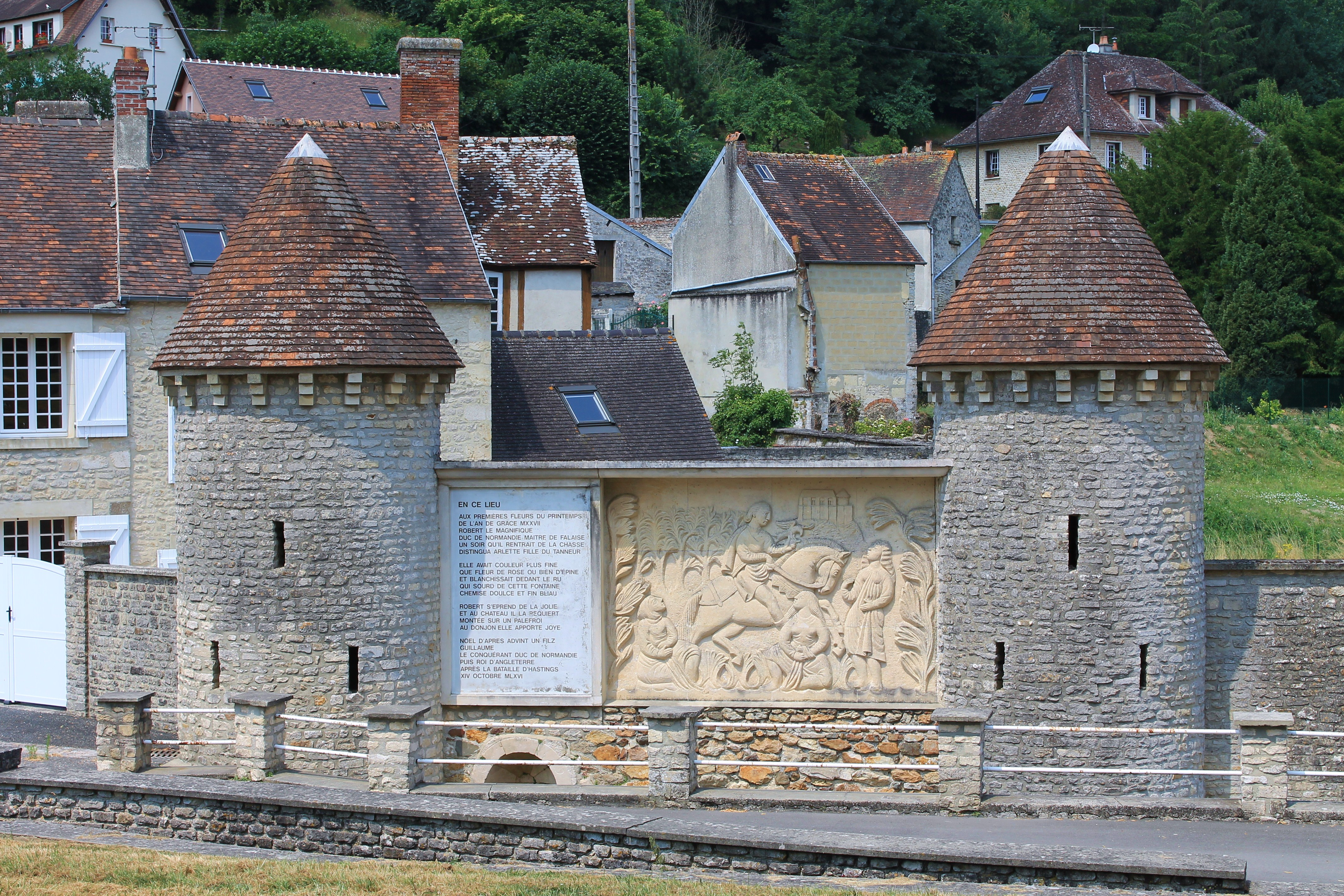 La Fontaine d'Arlette à Falaise (Calvados)